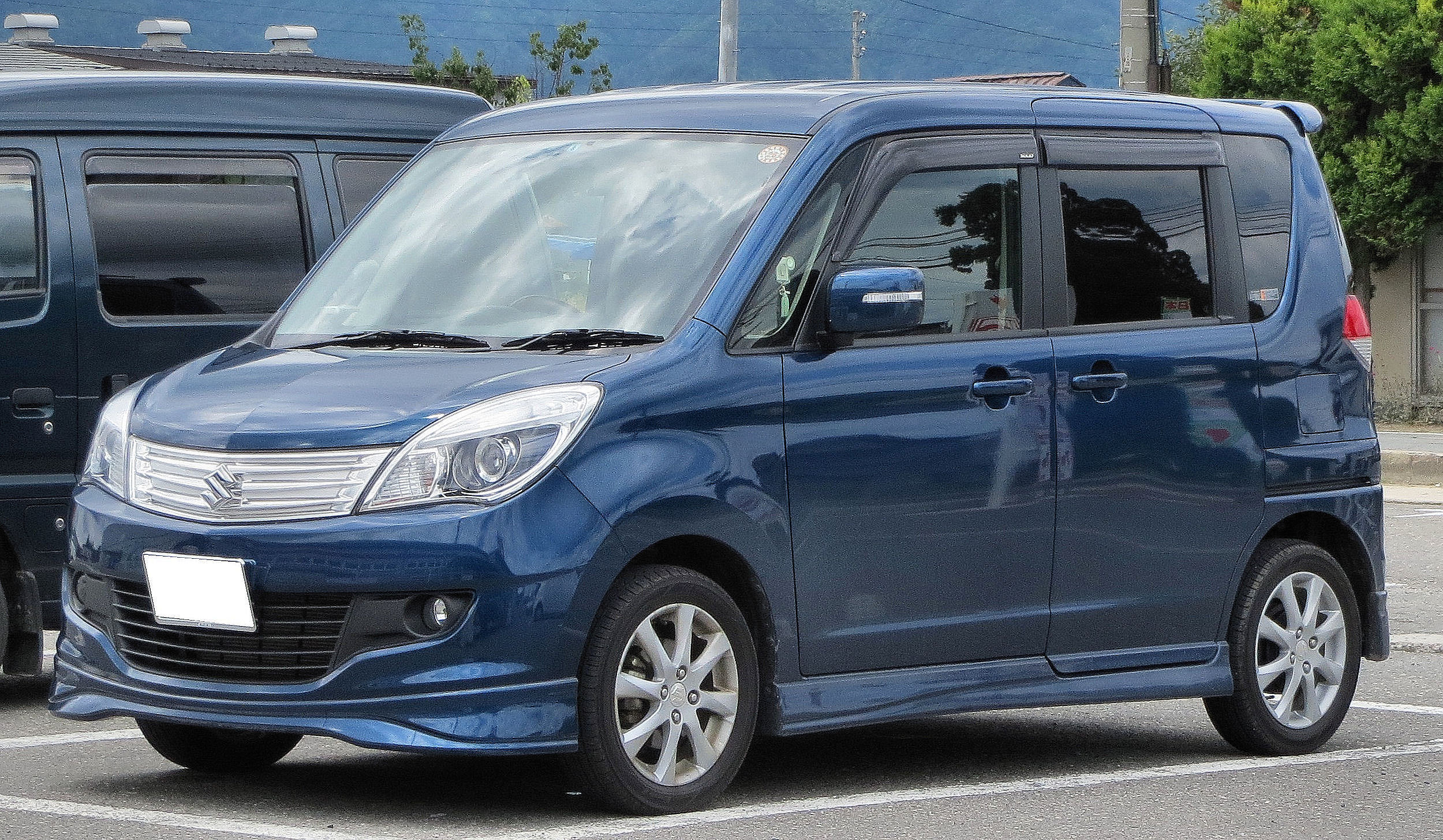 スズキ ソリオ S 2型